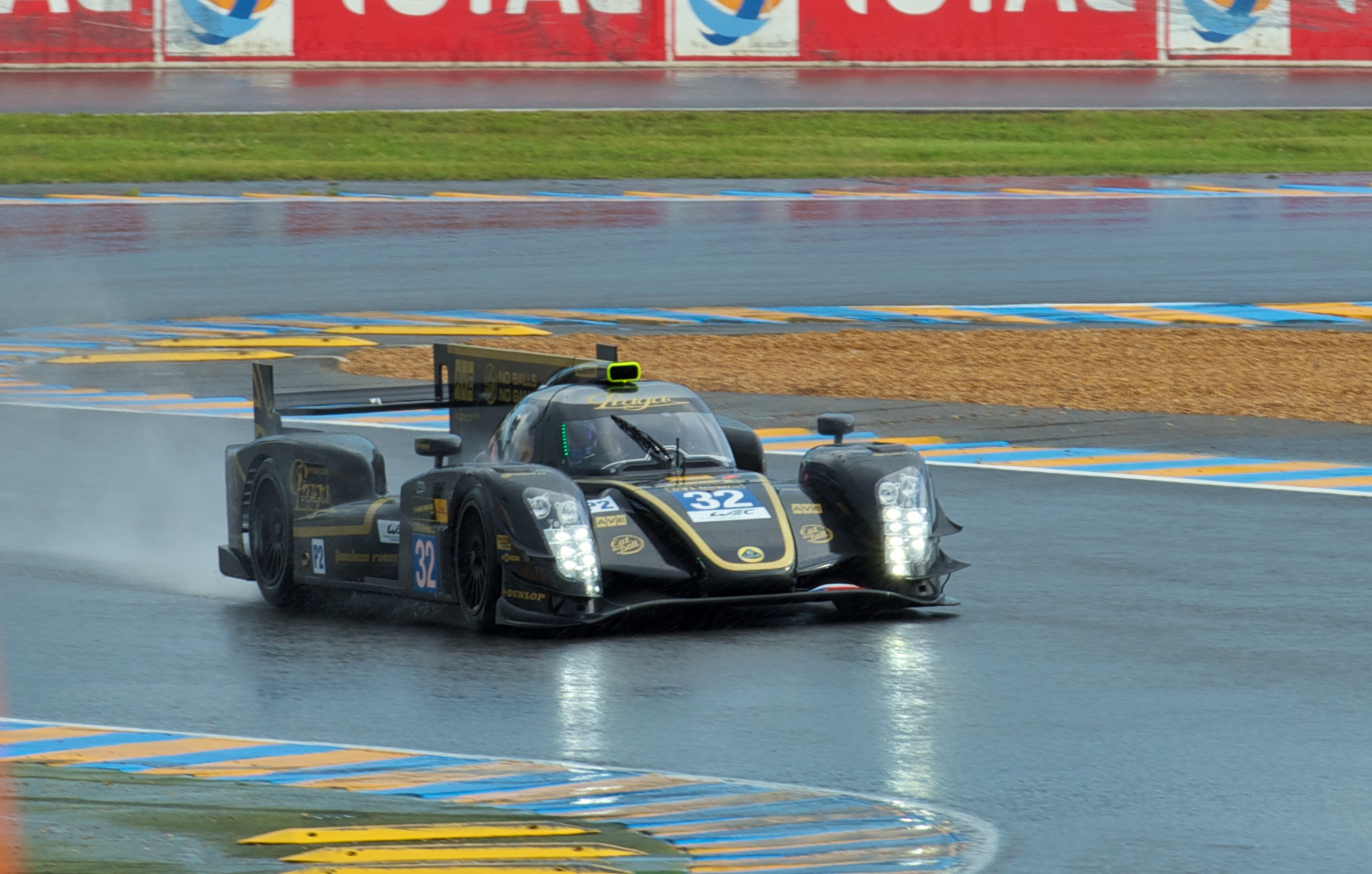 KAM_3880